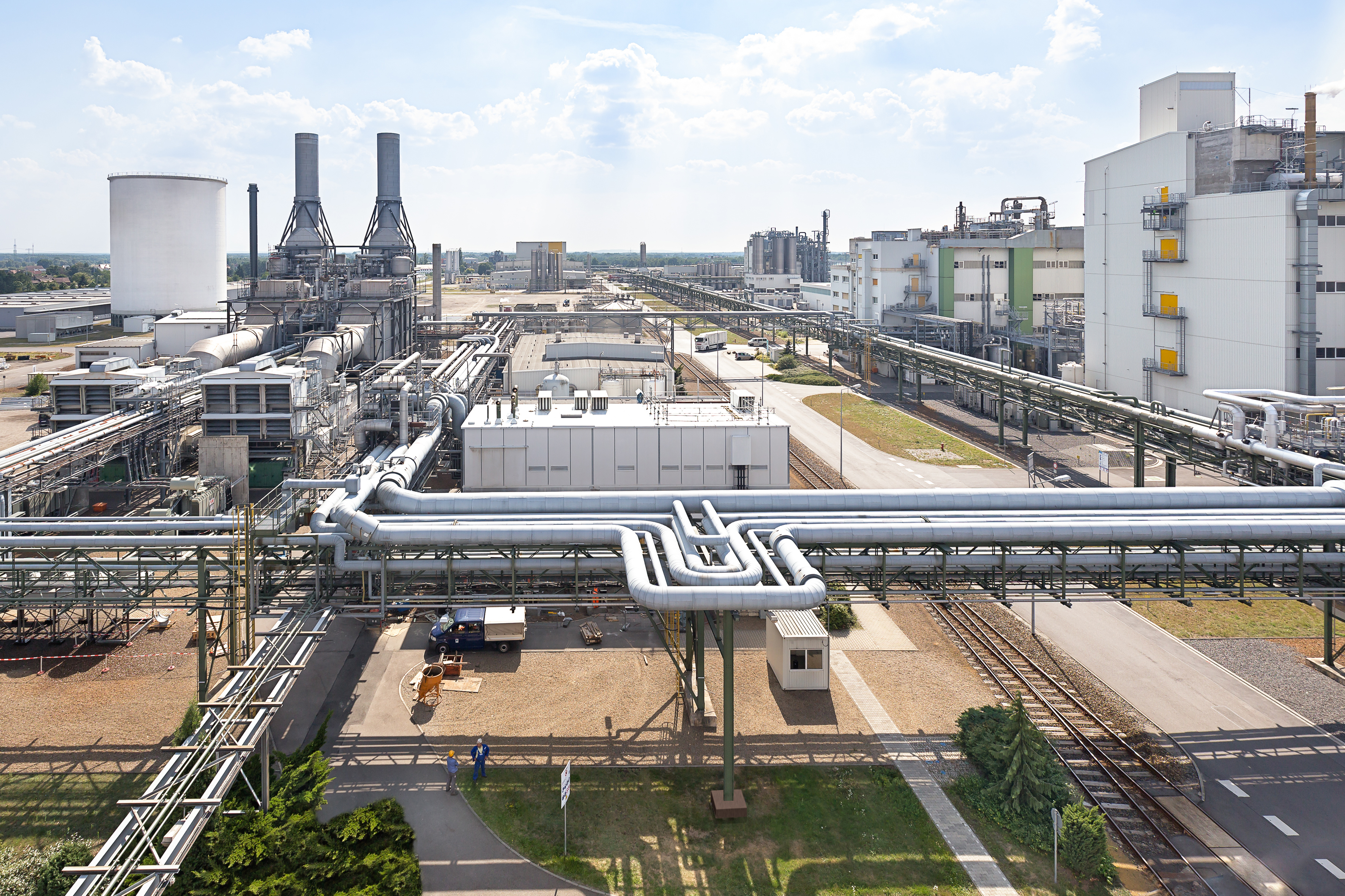 Werksansicht